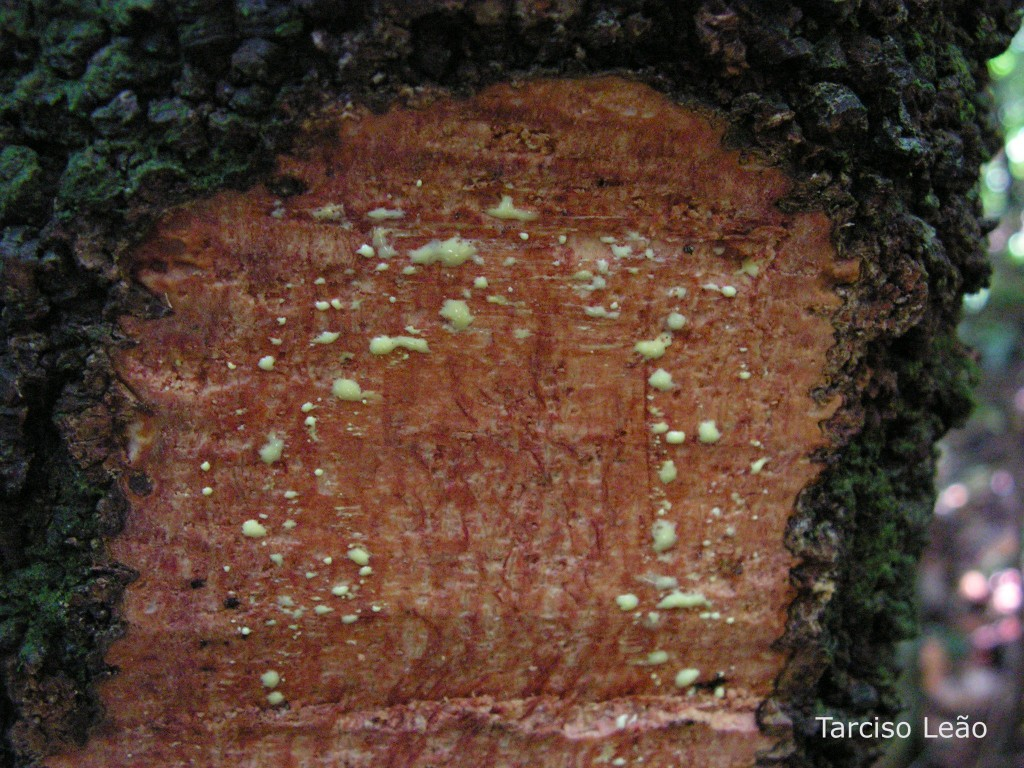 Local: Mata do Sabiá, Cabo de Santo Agostinho, Pernambuco, Brasil.